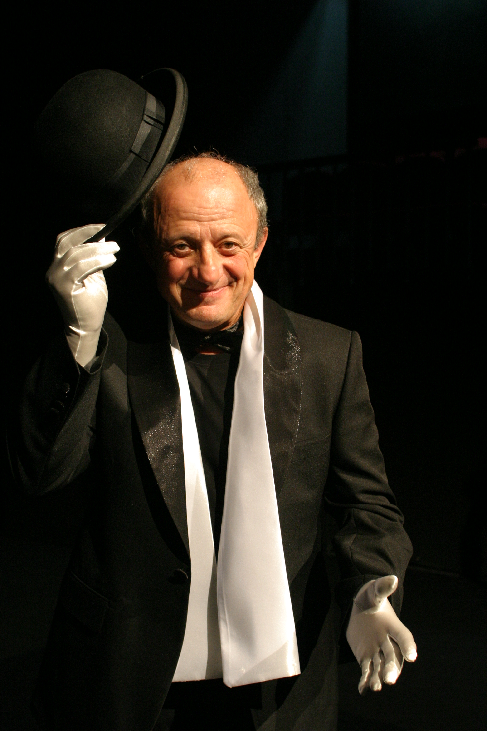 Actorul Mihai Mălaimare